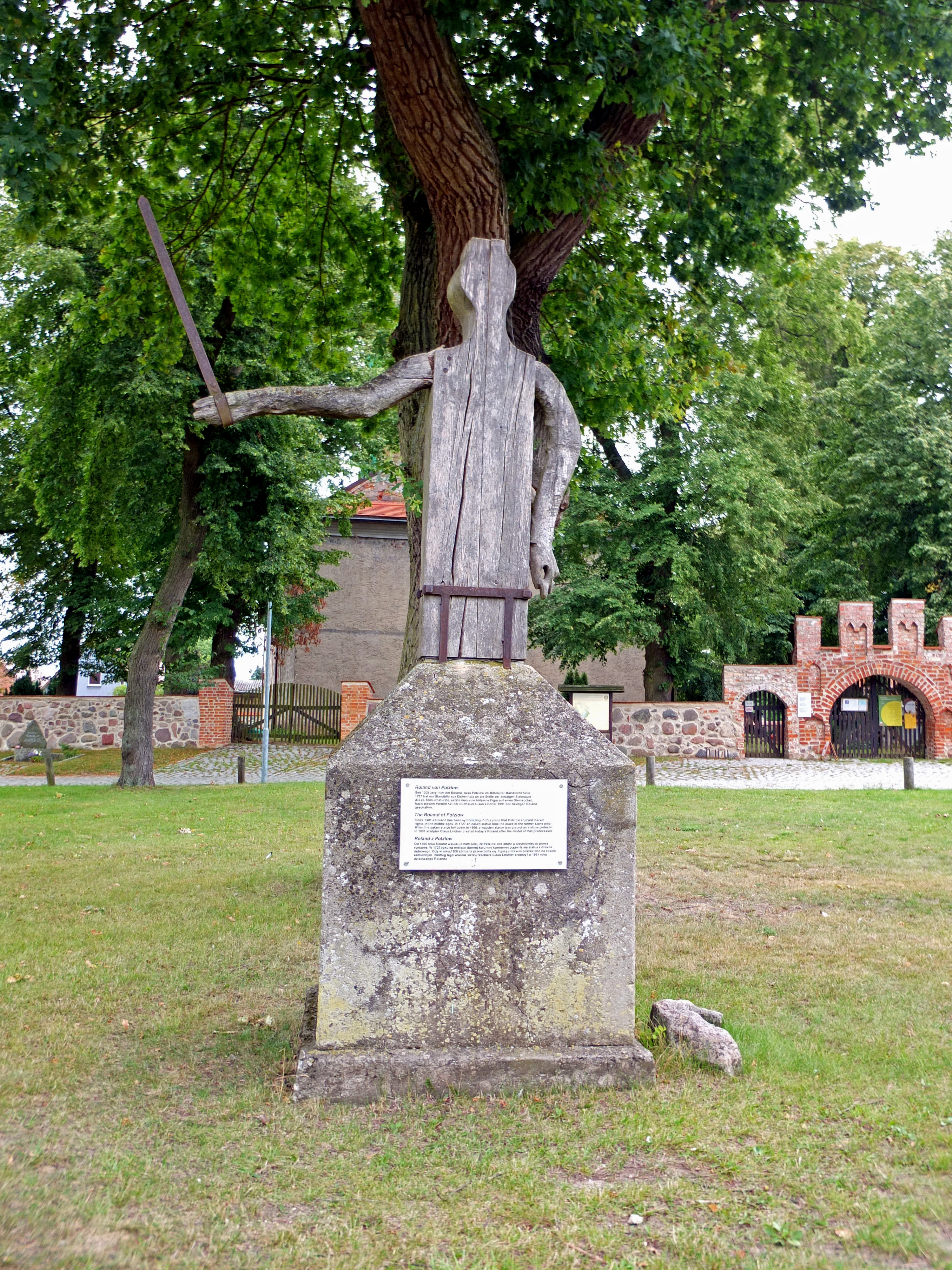 Denkmalgeschützter Roland und Kirchhofseinfriedung (im Hintergrund) in Potzlow (Gemeinde Oberuckersse, Landkreis Uckermark, Land Brandenburg, Deutschland)